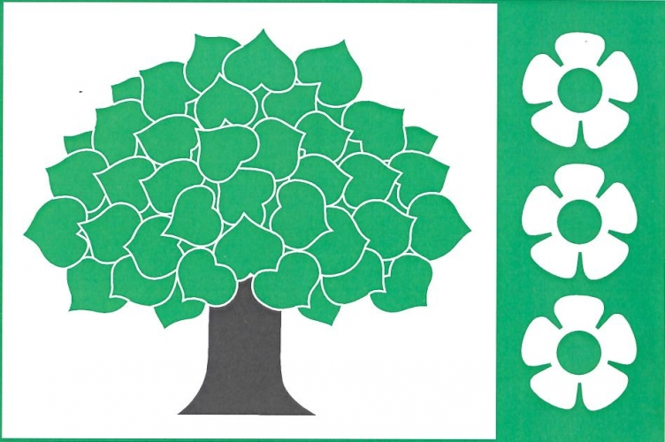 vlajka, Vysoké, okres Žďár nad Sázavou